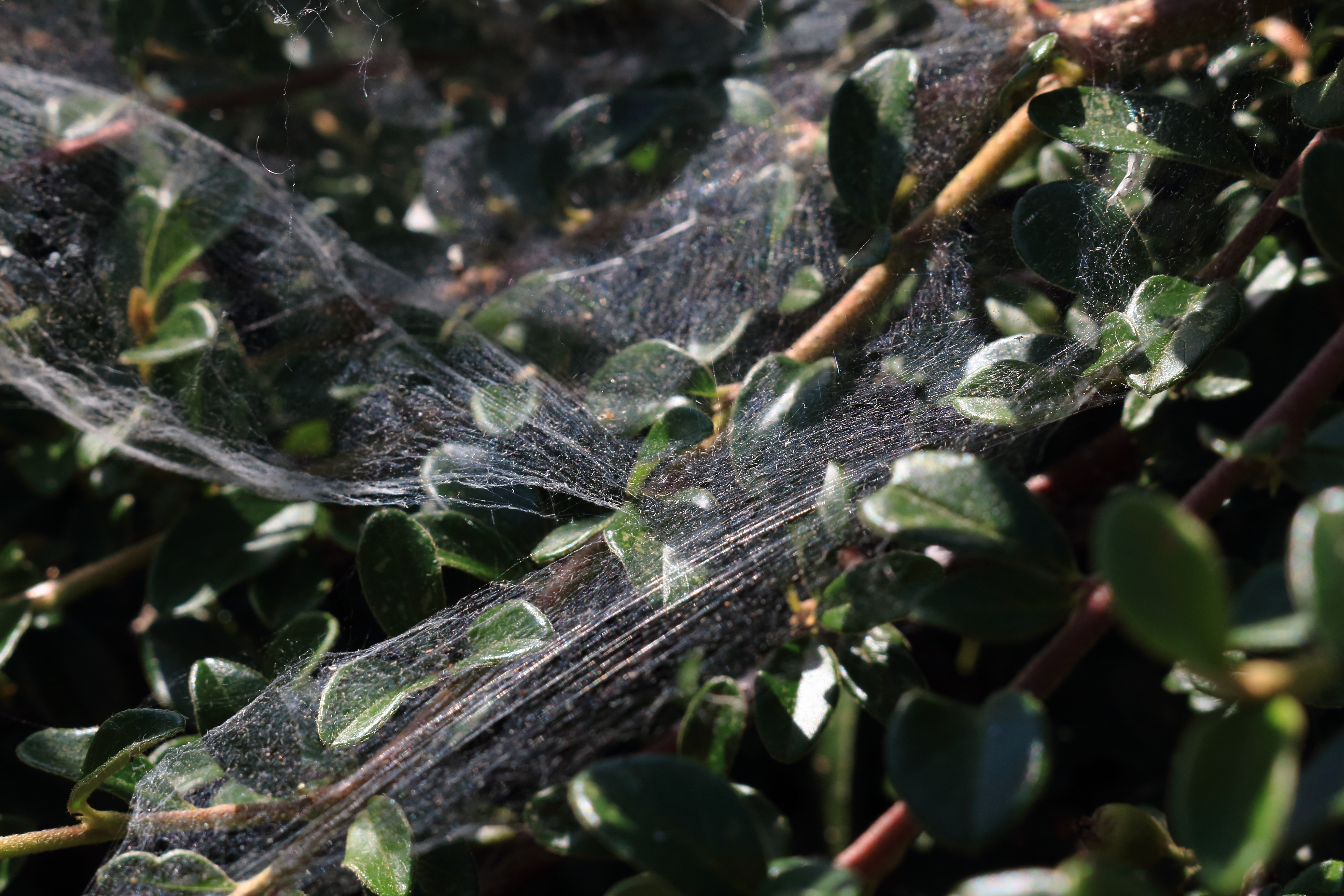 Trichter-Spinnennetze von Allagelena gracilens in der Hecke Die abgebildete Spinne/das Netz wurde am 14. Juli 2015 von Mhohner auf WP:RBIO/B bestimmt The spider/the web shown here has been identified from Mhohner on WP:RBIO/B 2015, July 14th